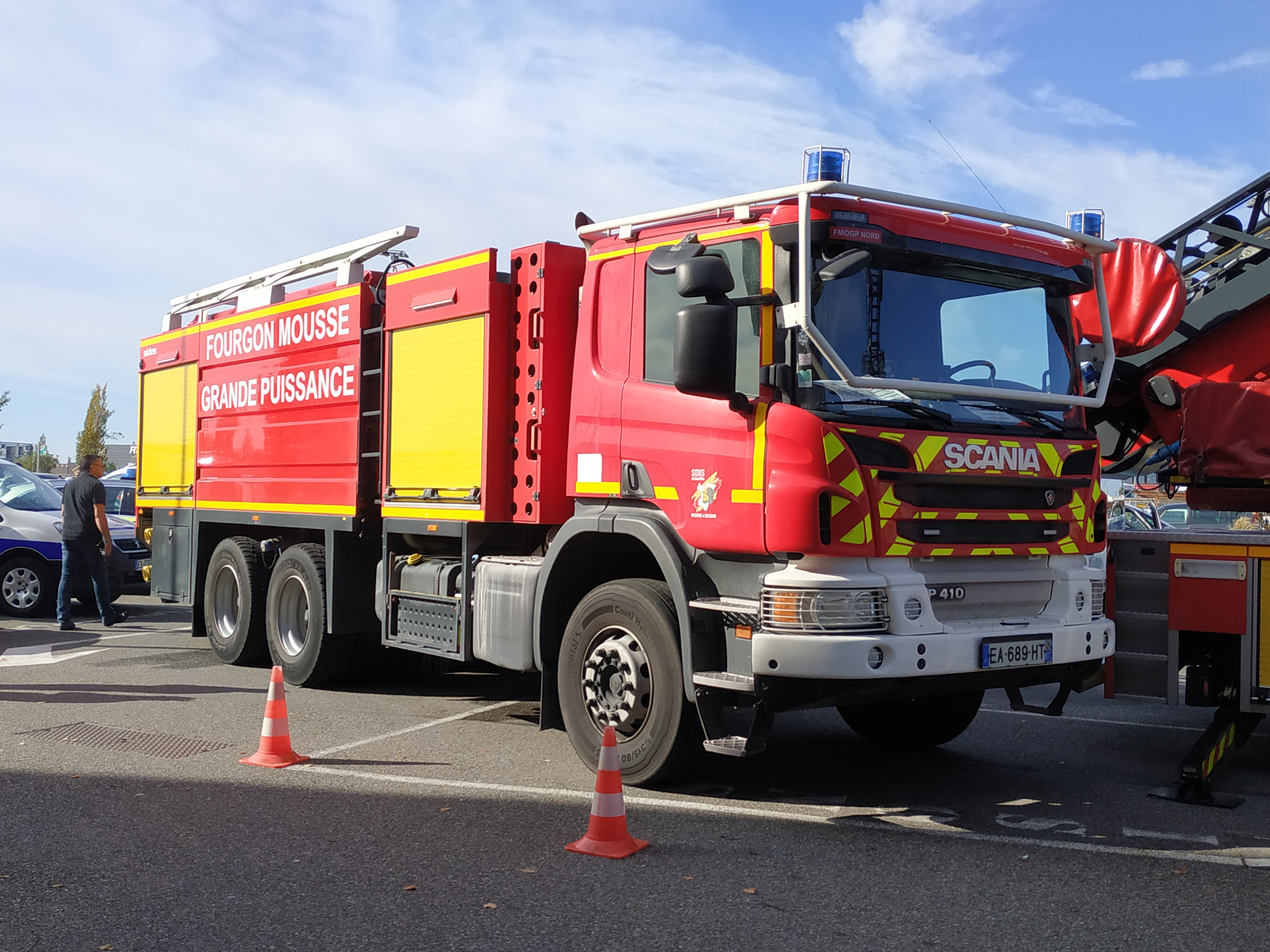 Fourgon mousse grande puissance du SDIS 67, sur base Scania P410 Photo prise à Mundolsheim dans le cadre des rencontres de la sécurité intérieure de 2019